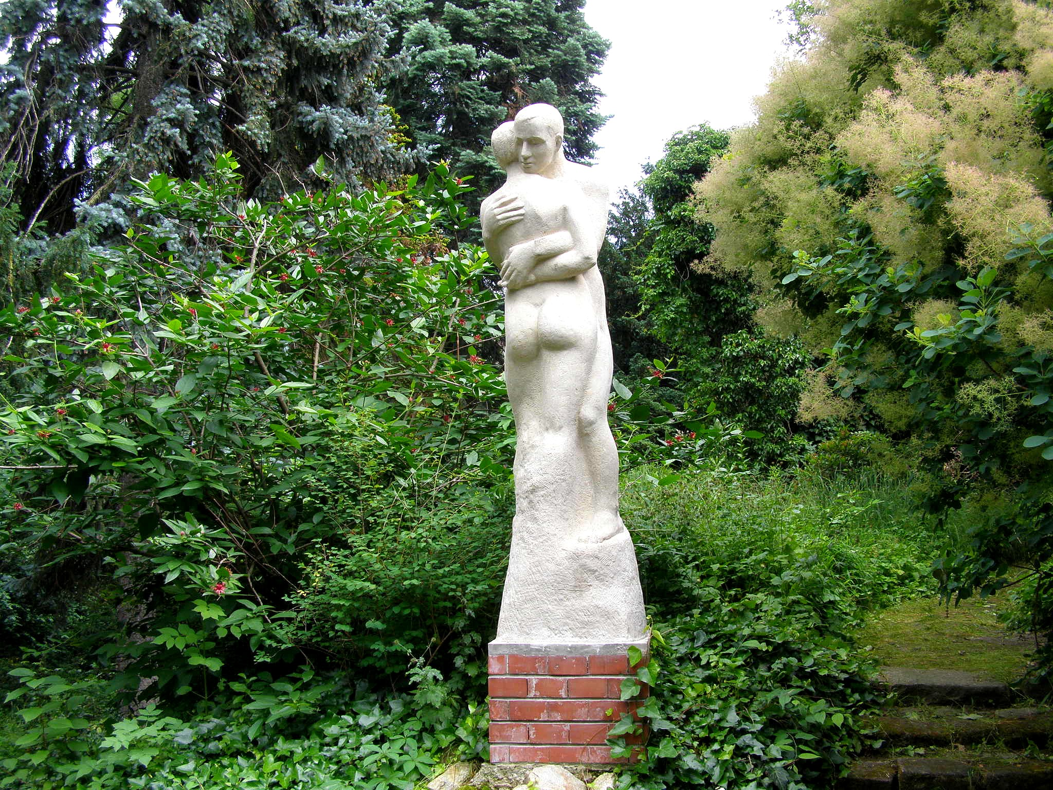 Súsošie Milenci